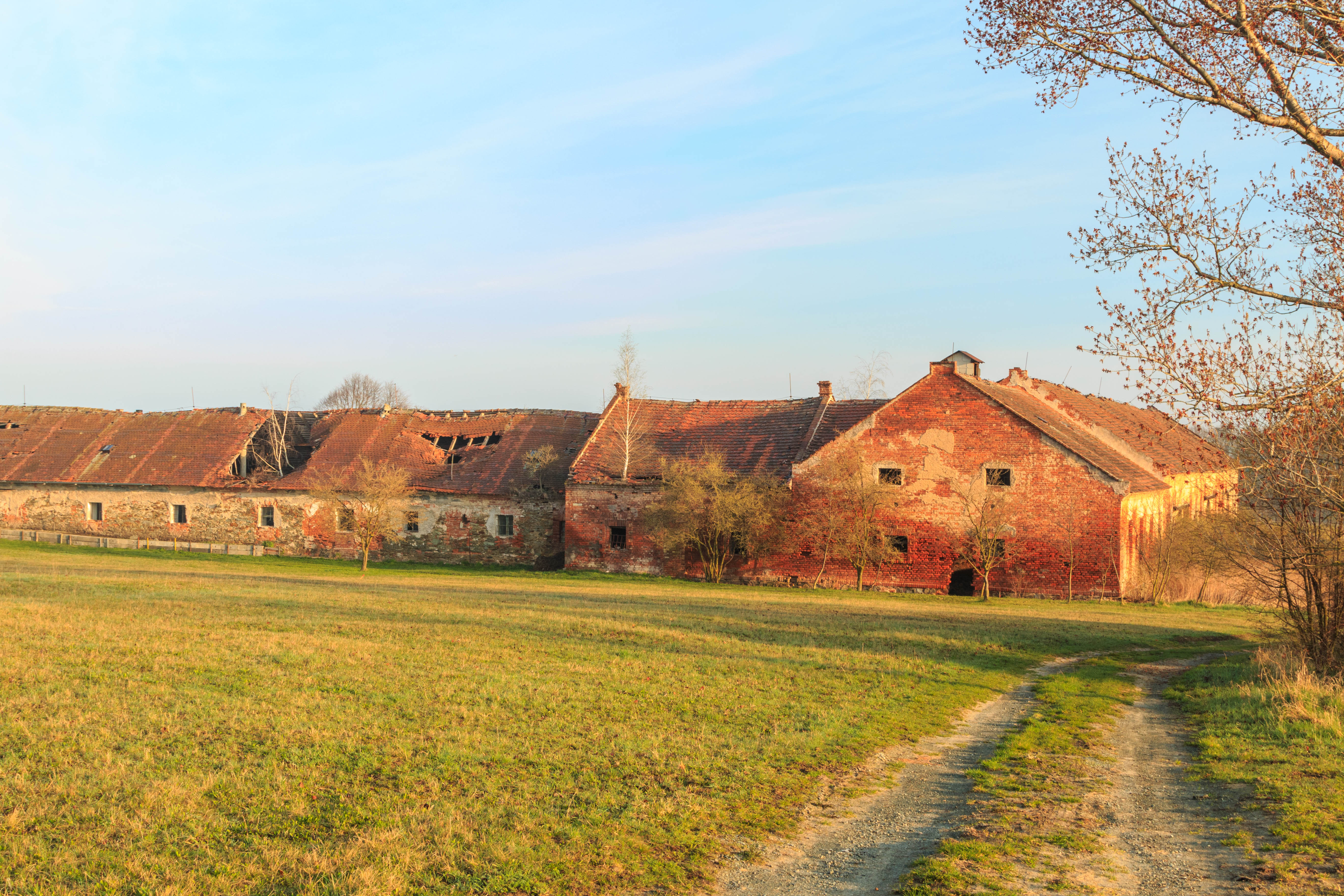 Horecký dvůr